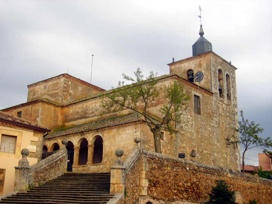 Iglesia de San Nicolás de Bari de Fresno de Cantespino, Segovia (España)